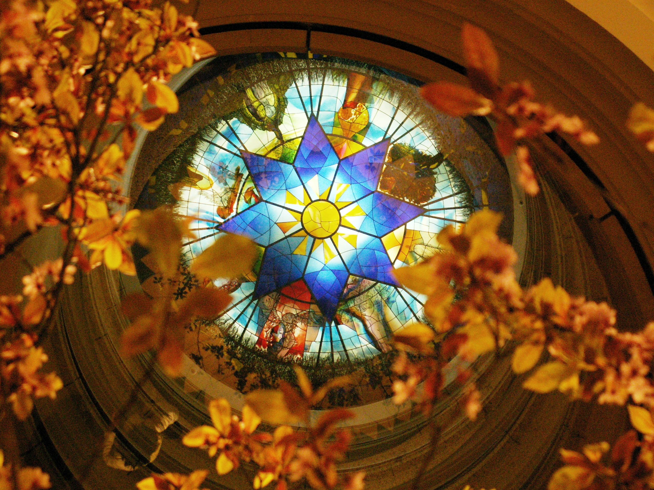 Mosaikfenster in der Mittelkuppel der Einkaufspassage im Levantehaus in Hamburg, Deutschland. Cupola roof mosaic window in the middle of the shopping mall Levantehaus in Hamburg, Germany.